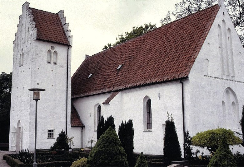 Bårse Kirke i Danmark. Bårse kirke